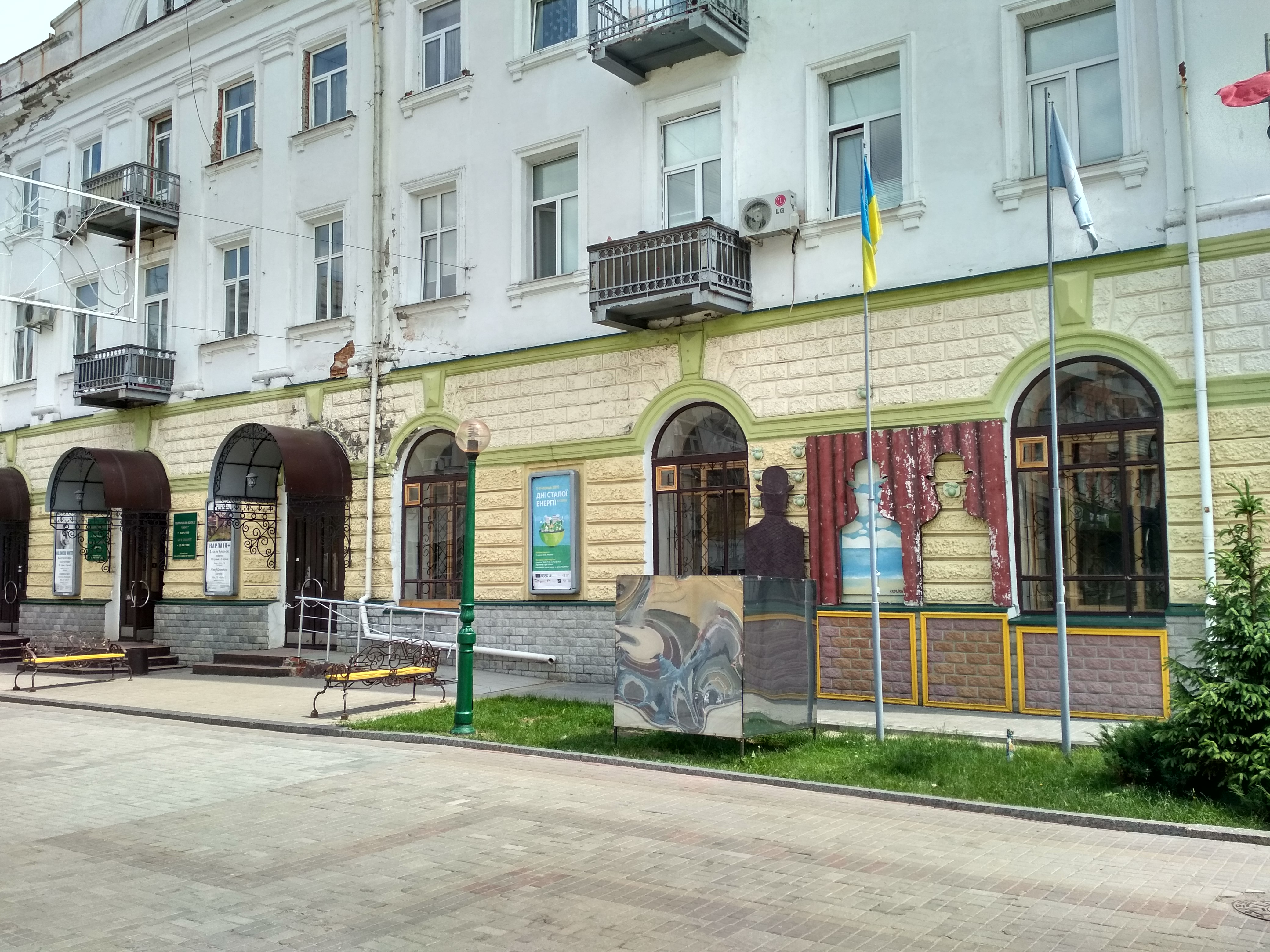 галерея